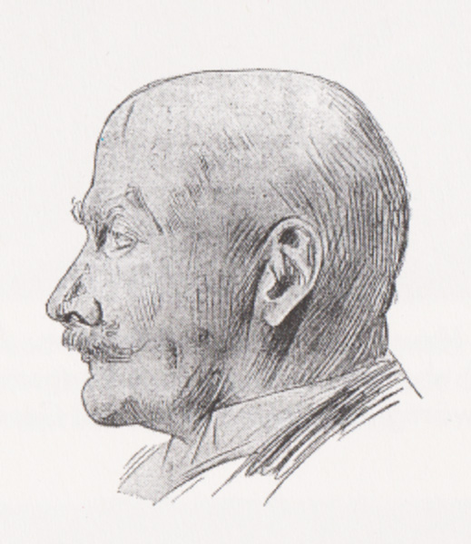 Der Leipziger Pelzgroßhändler Alfred Selter